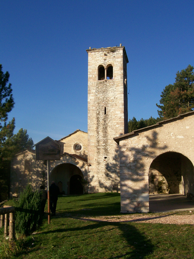 Chiesa di San Leonardo sul monte di San Moro